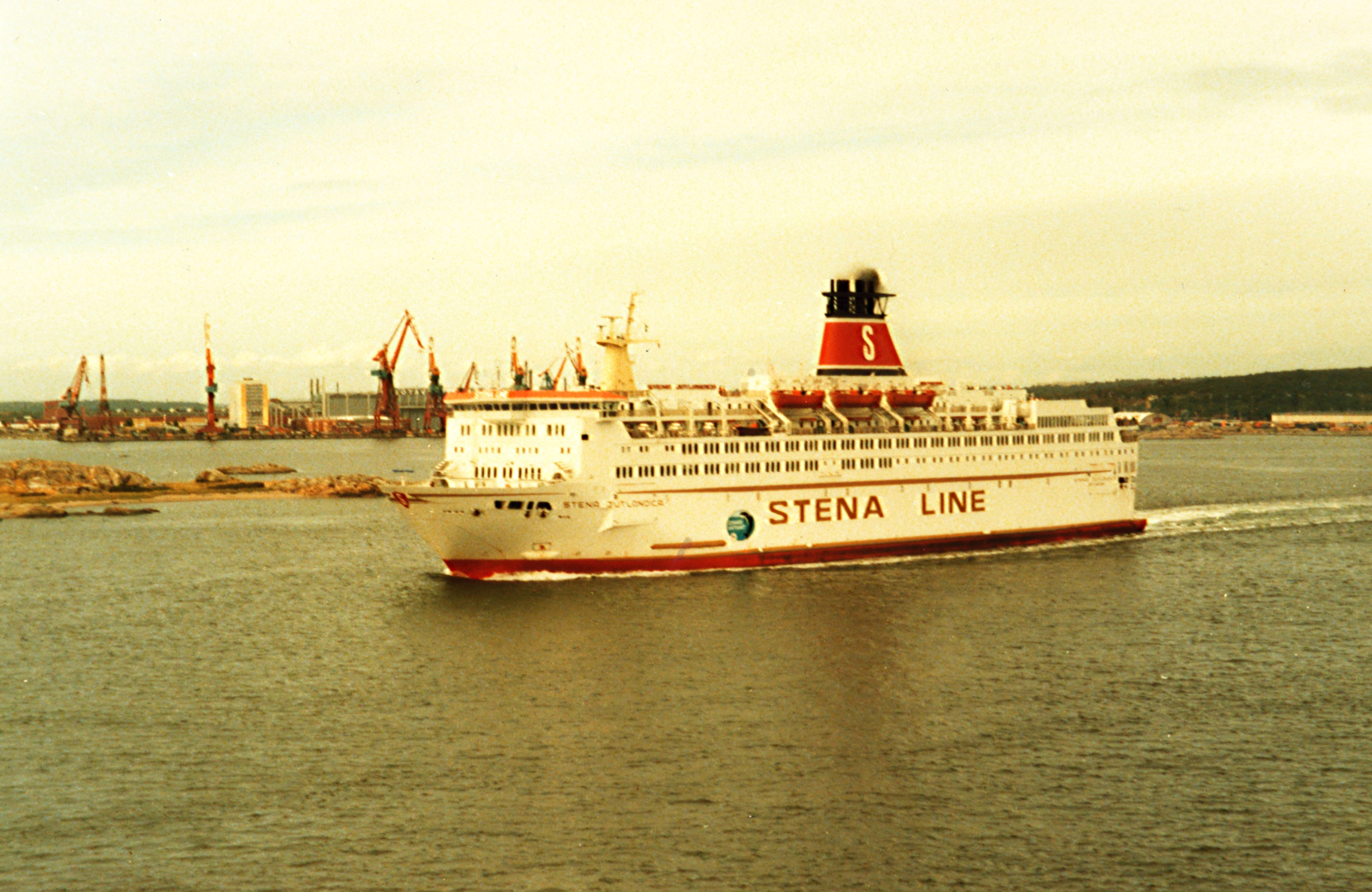 Stena Jutlandica II, utanför Klippan (ca. 1983-1996)